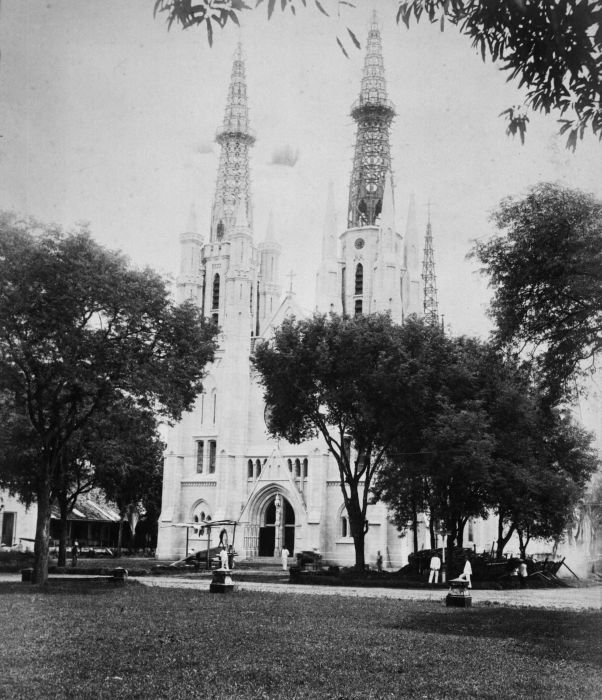 Foto. De kathedraal aan het Waterlooplein in Batavia